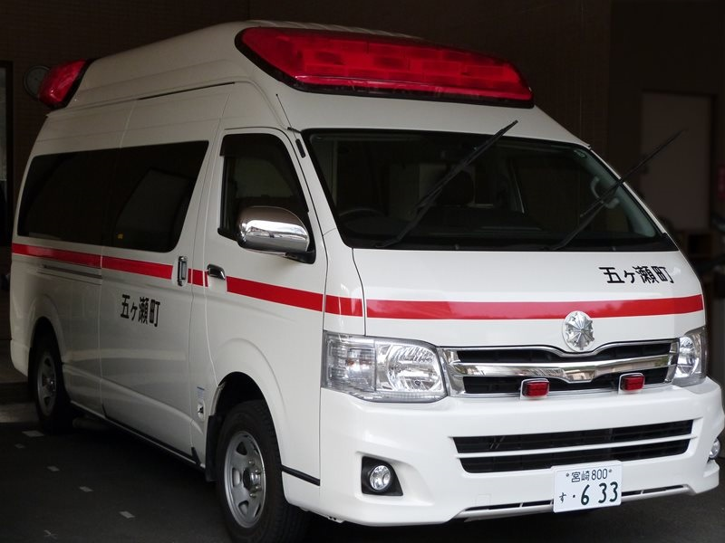 常備消防が無い山間部の町の救急車